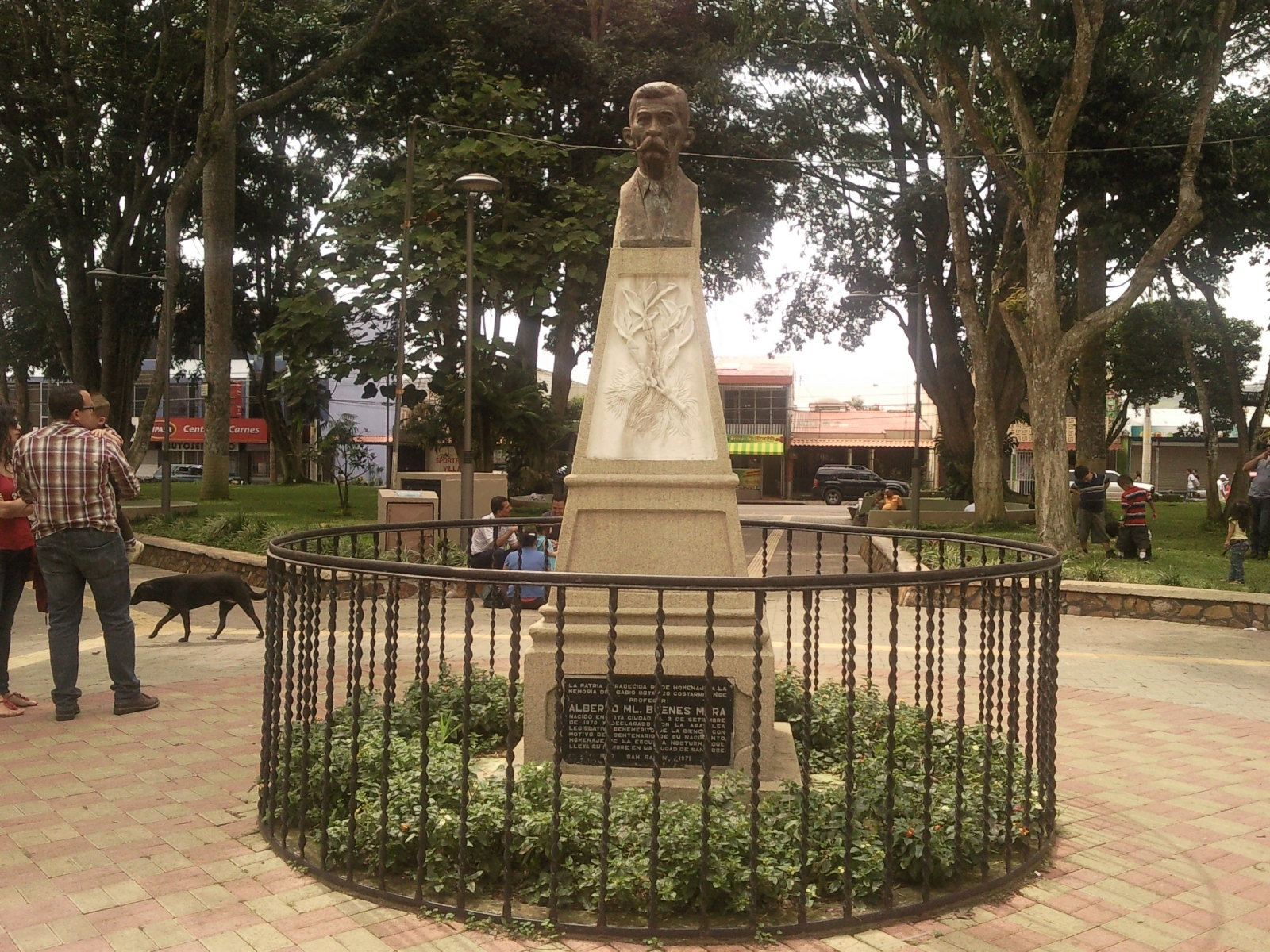 escultura de alberto manuel brenes mora